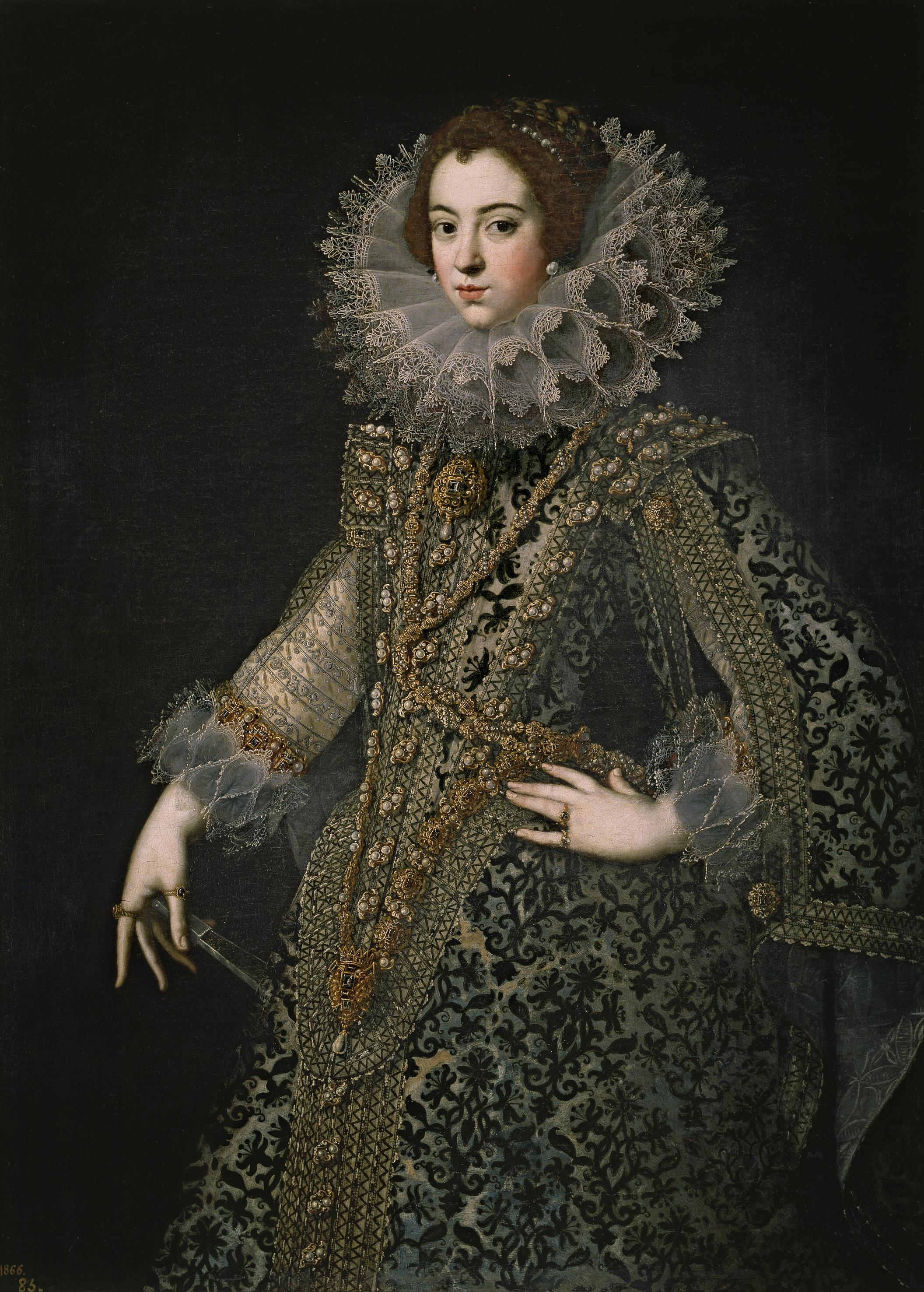 Retrato de la reina Isabel de Borbón (1602-1644), que fue hija del rey Enrique IV de Francia y la primera esposa del rey Felipe IV de España. El estilo de este pintor anónimo se relaciona con los retratistas de la segunda mitad del s. XVI e inicios del XVII: Antonio Moro, Sánchez Coello o Pantoja de la Cruz, caracterizado por la filigrana de los vestidos, la fuerte iluminación empleada y la atención al rostro y las manos. Su atribución resulta complicada, considerando Allende-Salazar que podría tratarse de un retrato ejecutado por Angelo Nardi, pintor italiano que llegó a España en 1607, trabajando hasta su fallecimiento en 1665. (Ficha en Artehistoria). En su Historia y guía de los museos de España, Juan Antonio Gaya Nuño lo describe como "retrato anónimo, excelente, acaso por Angelo Nardi, de la reina Isabel de Borbón, primera esposa de Felipe IV". En otra fuente (Arte y saber: la cultura en tiempos de Felipe III y Felipe IV : 15 abril-27 junio 1999) se indica: "retrato de Isabel de Borbón (de 1618 por Bartolomé González para la Sala de Retratos de El Pardo). Atribuido en el pasado a Pantoja de la Cruz y al italiano Angelo Nardi (1584-1666), quizá podría ser obra de Rodrigo de Villandrando, retratista muy desigual.